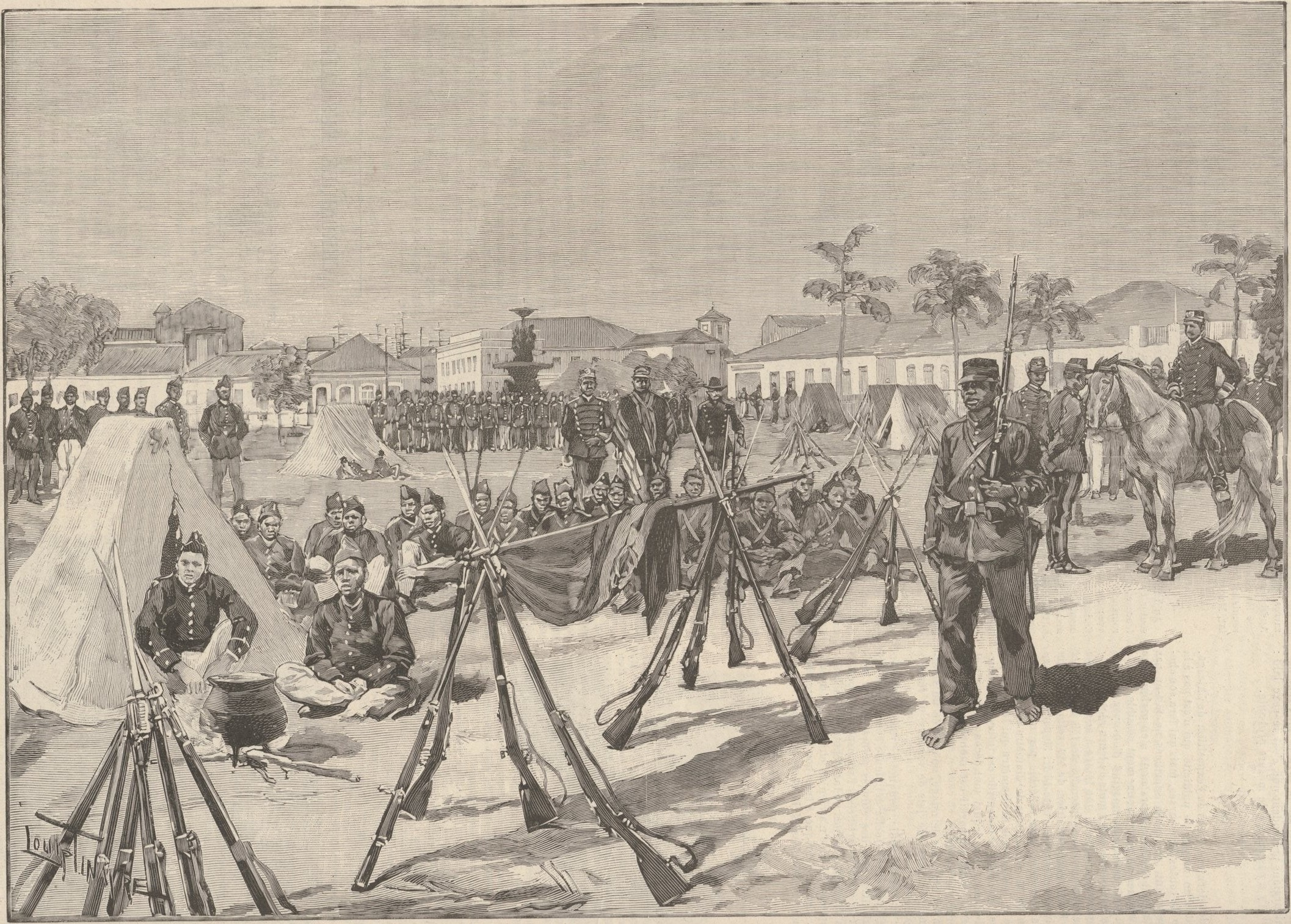 BRÉSIL. — Le 32º bataillon d'infanterie occupant la Praza 7 do Setembro a Rio Grande do Sul, après la défaite des fédéralistes. — (Dessin de M. L. Tinayre, d'après les photographies communiquées par M. Emite Tancke).